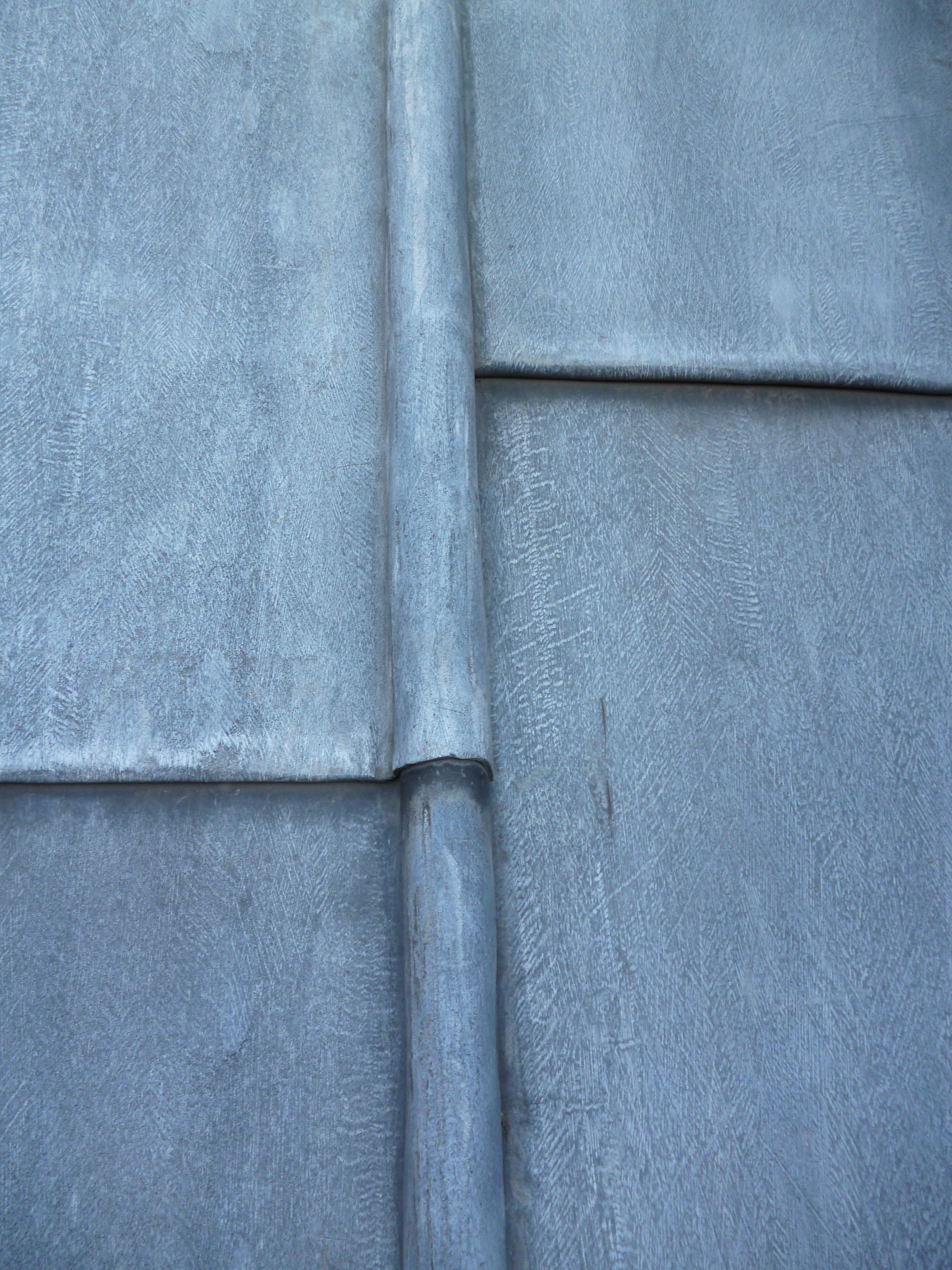 Köln Dom Detail Bleidach